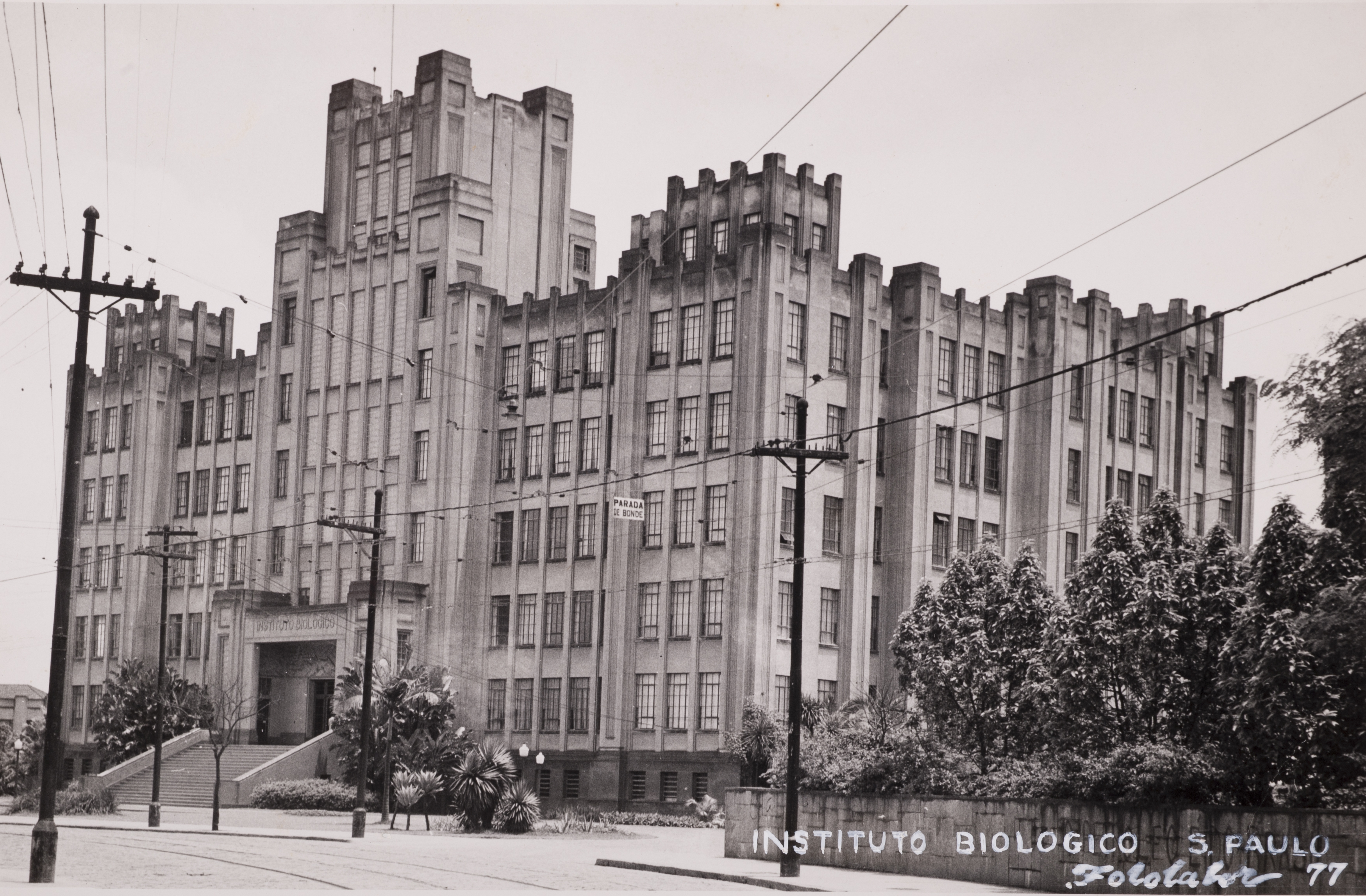 Obra que integra o acervo do Museu Paulista da USP. Coleção Werner Haberkorn - CHW